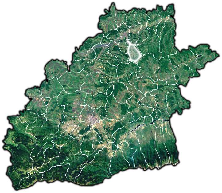 Mosna jud Sibiu